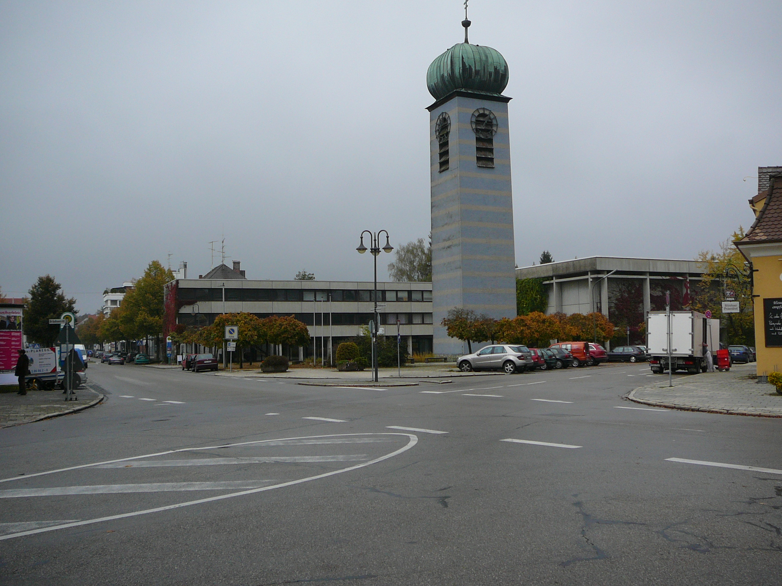 katholische Kirche St. Elisabeth in Planegg